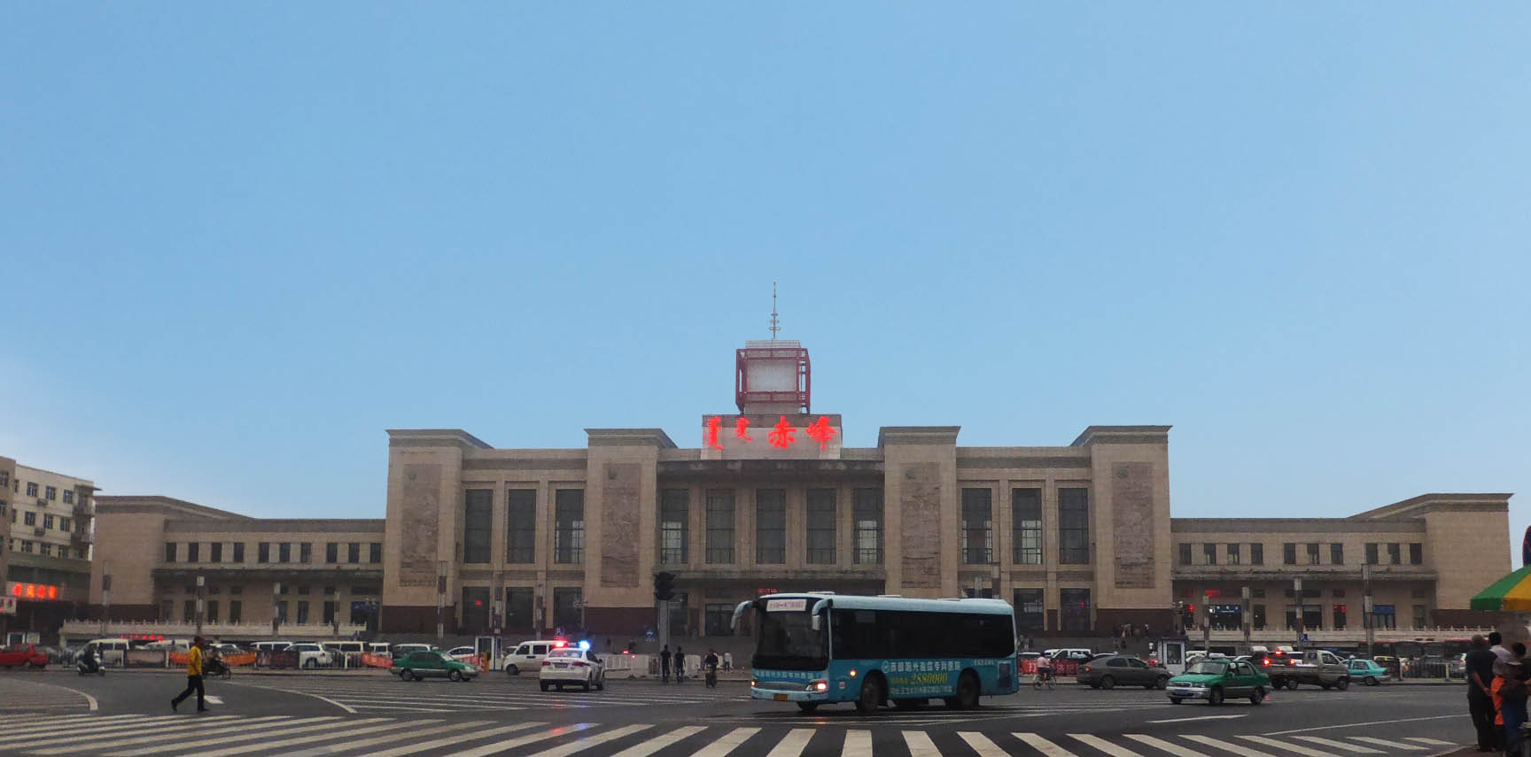 中文（中国大陆）: 赤峰市赤峰火车站